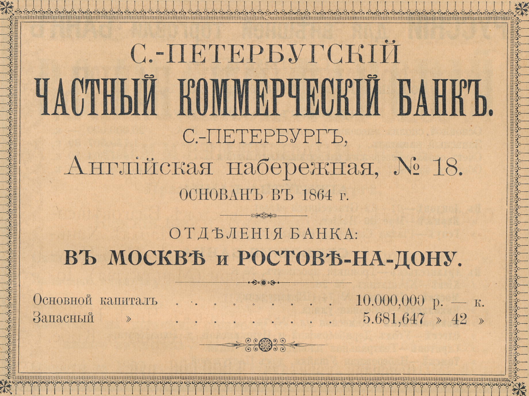 Реклама Санкт-Петербургского частного коммерческого банка, справочник "Весь Петербург", 1899 год.